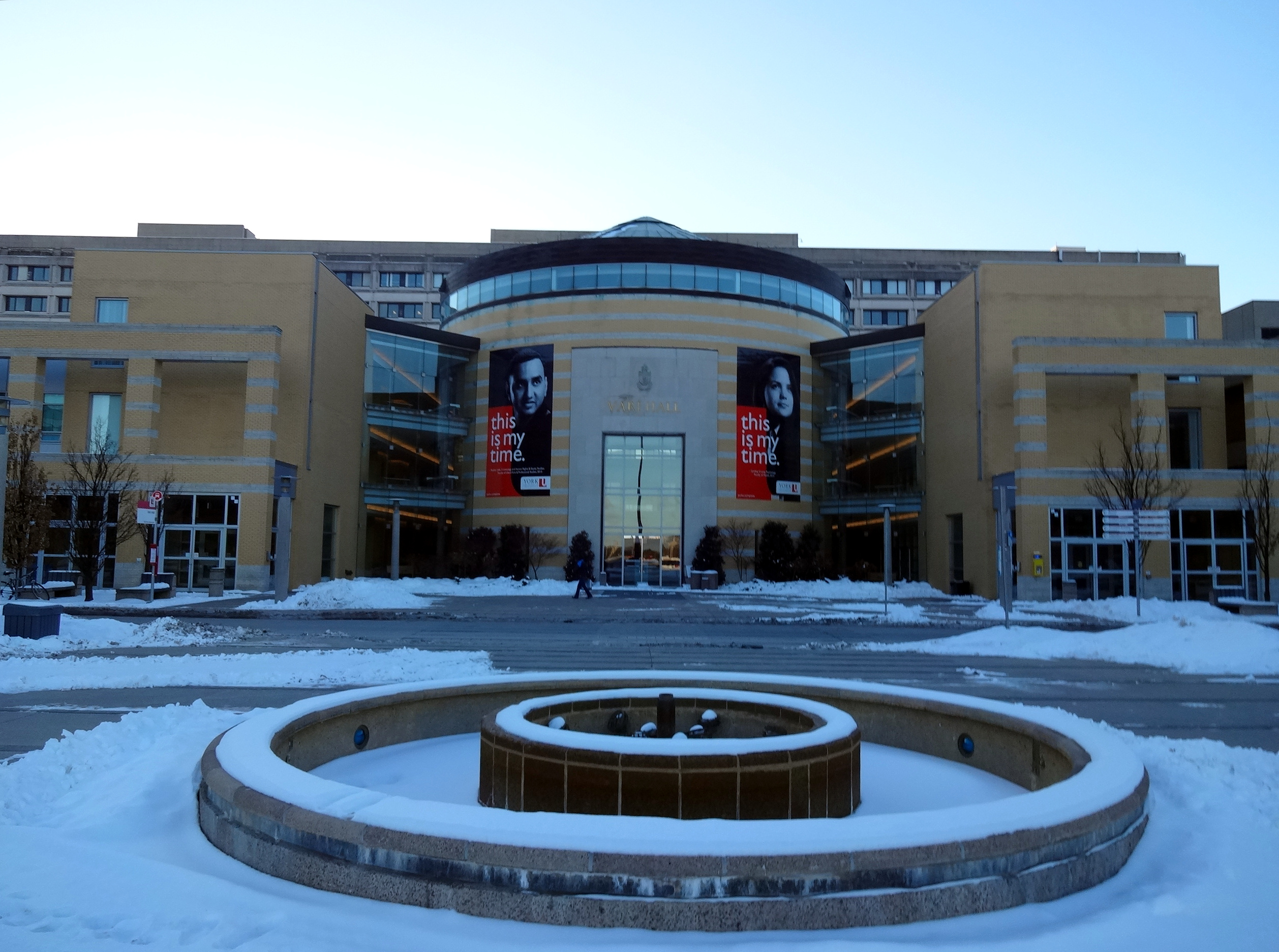 Praça na York University.